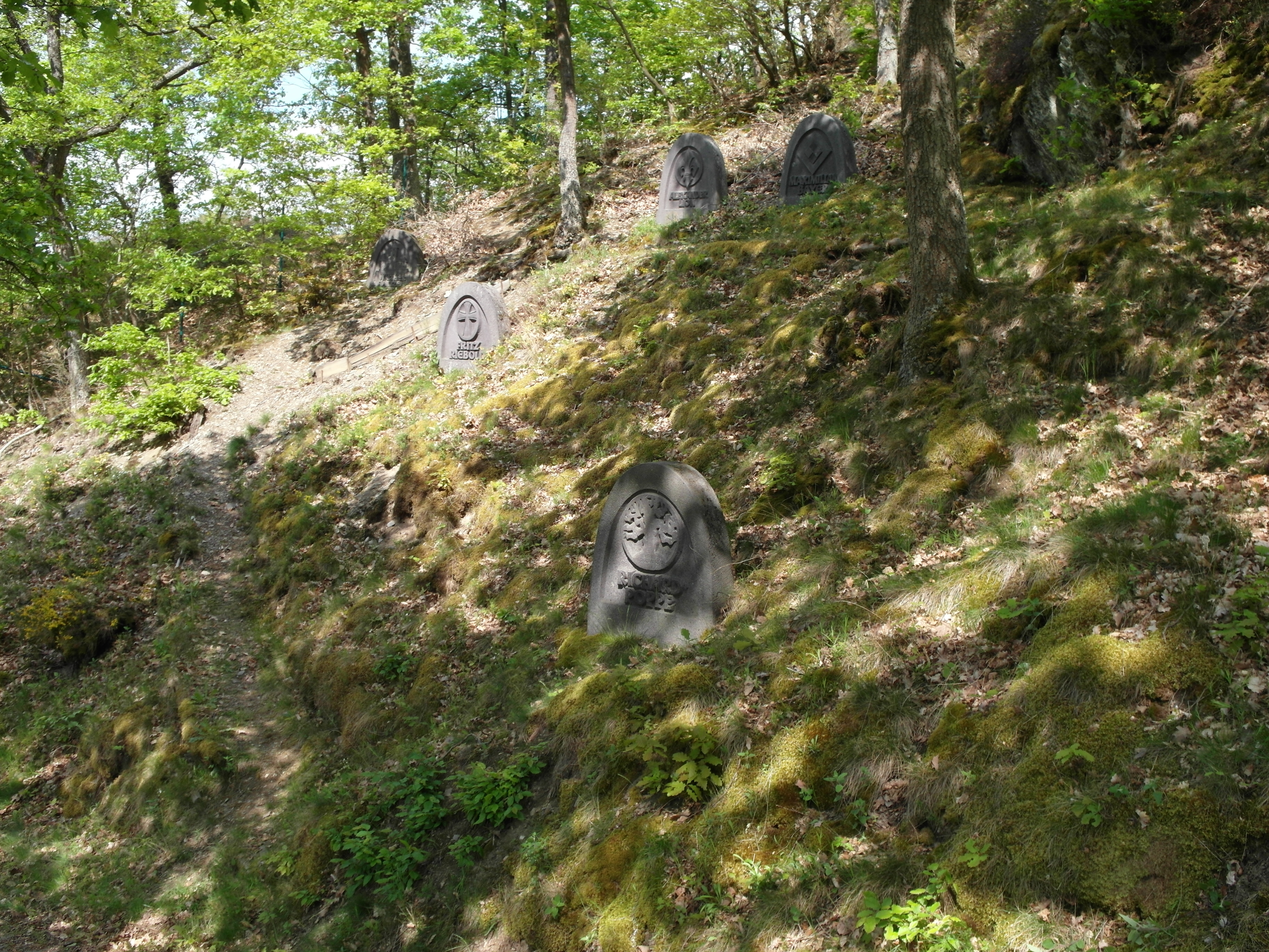 Burg Waldeck (Hunsrück); Ehrenhain der Jugendbewegung; Gedenksteine für Walther Jantzen, Fritz Riebold, Alexander Lion, Maximilian Bayer und Richard Poppe (von links)